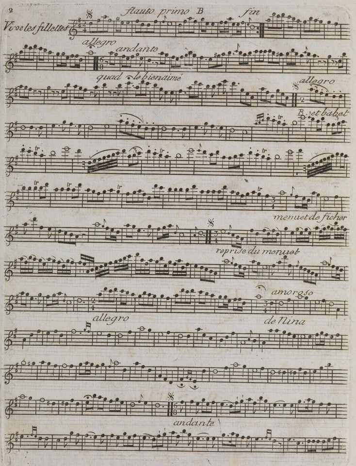 Vive les fillette, cançoneta d'Antonio Albanese